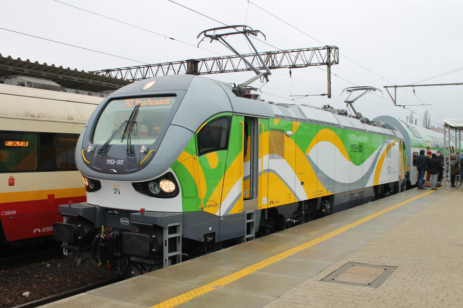 Lokomotywa elektryczna Pesa Gama 111Eb-001 stoi przy peronie 5 stacji Warszawa Wschodnia podczas uroczystego przekazania Kolejom Mazowieckim pociągów push-pull wyprodukowanych przez Pesę Bydgoszcz.